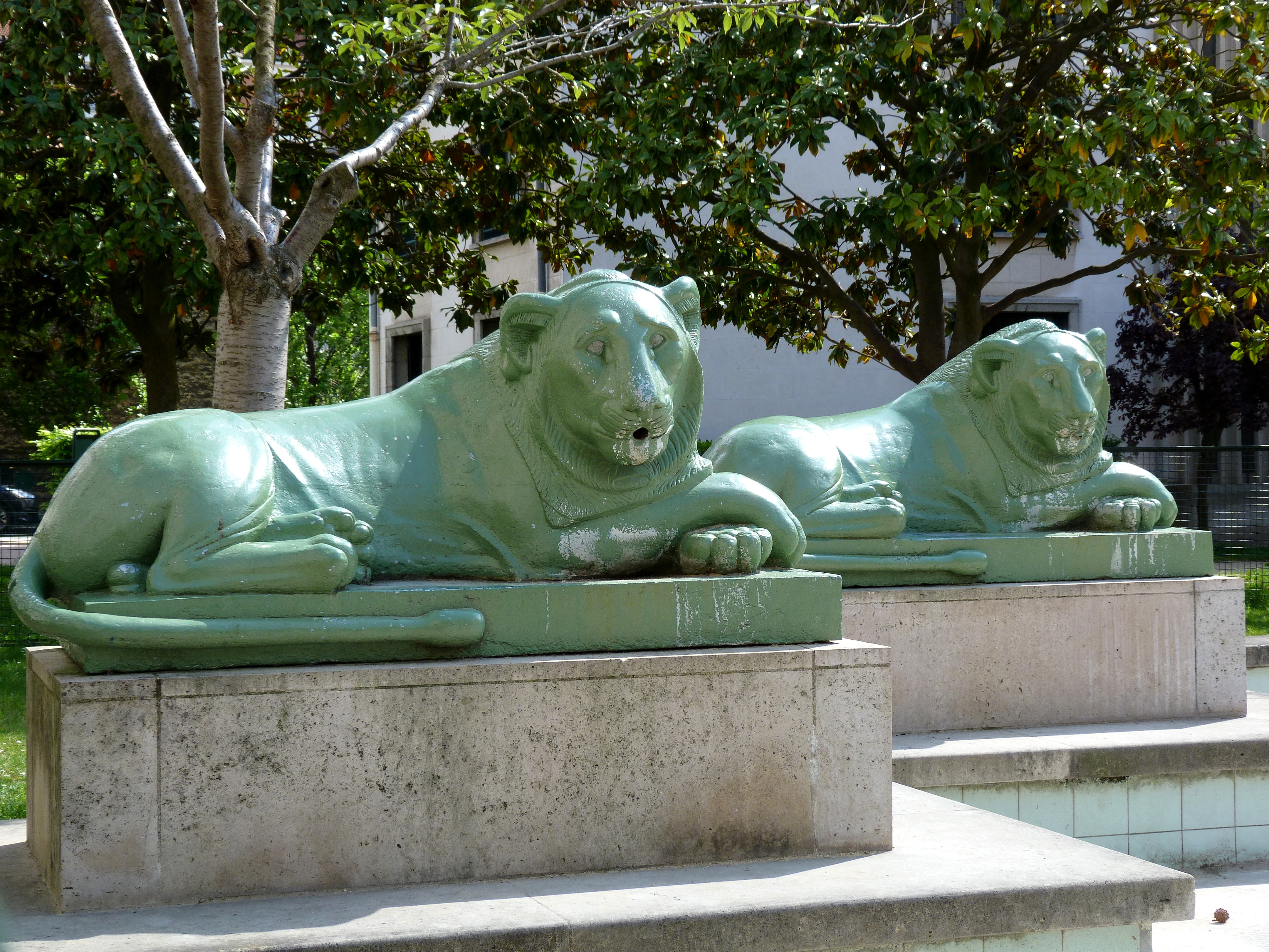 Deux des quatre lions originellement disposés en 1811 à la fontaine de l'Institut à Paris. Copie des lions du pharaon Nectanebo 1er (musée du Louvre). Fontaine des Lions du Square des frères Farman, Boulogne-Billancourt (Hauts-de-Seine).